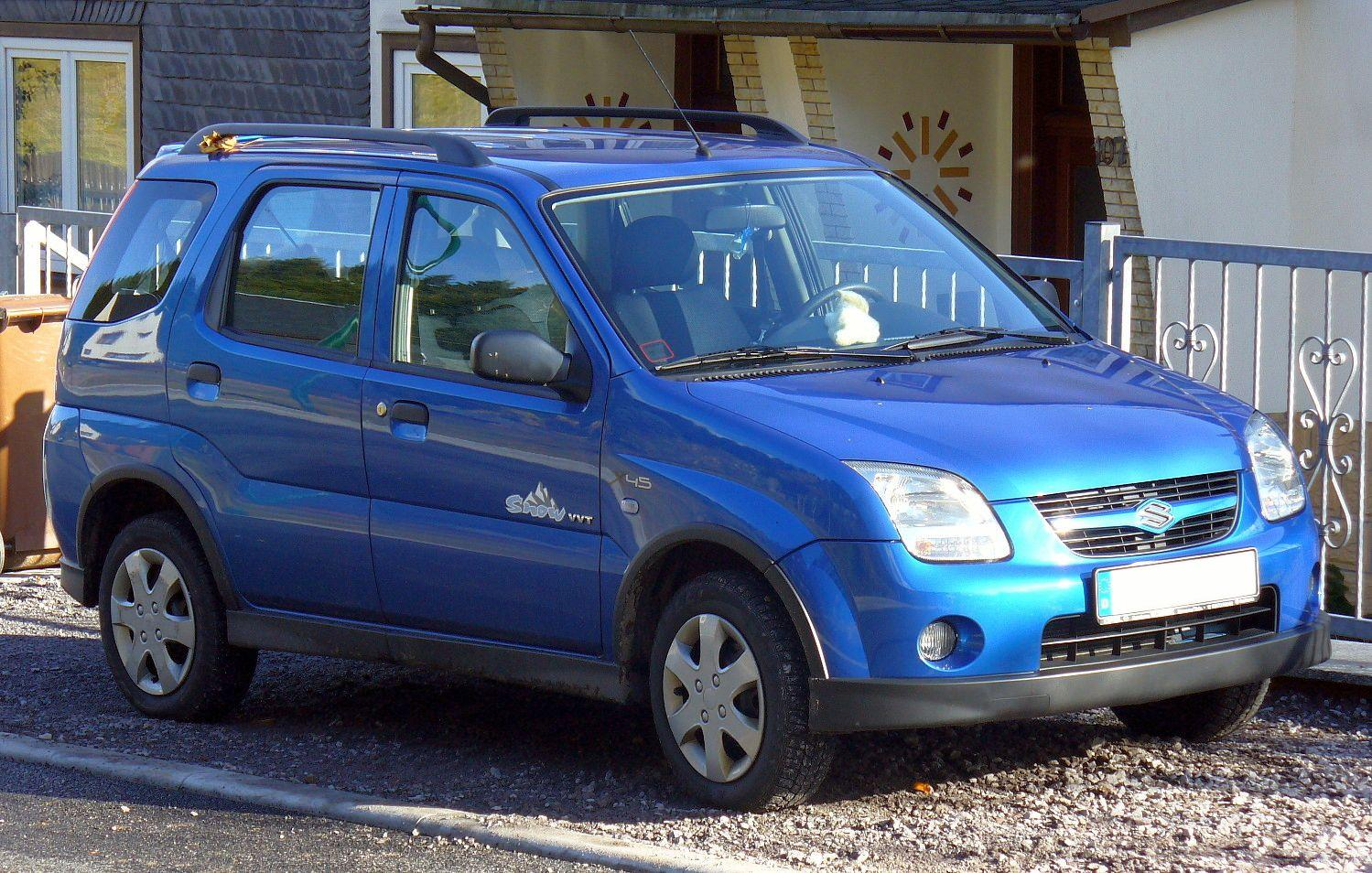 Suzuki Ignis Snow